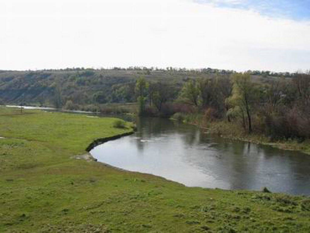 Старобельск. Пляж. Обрыв.